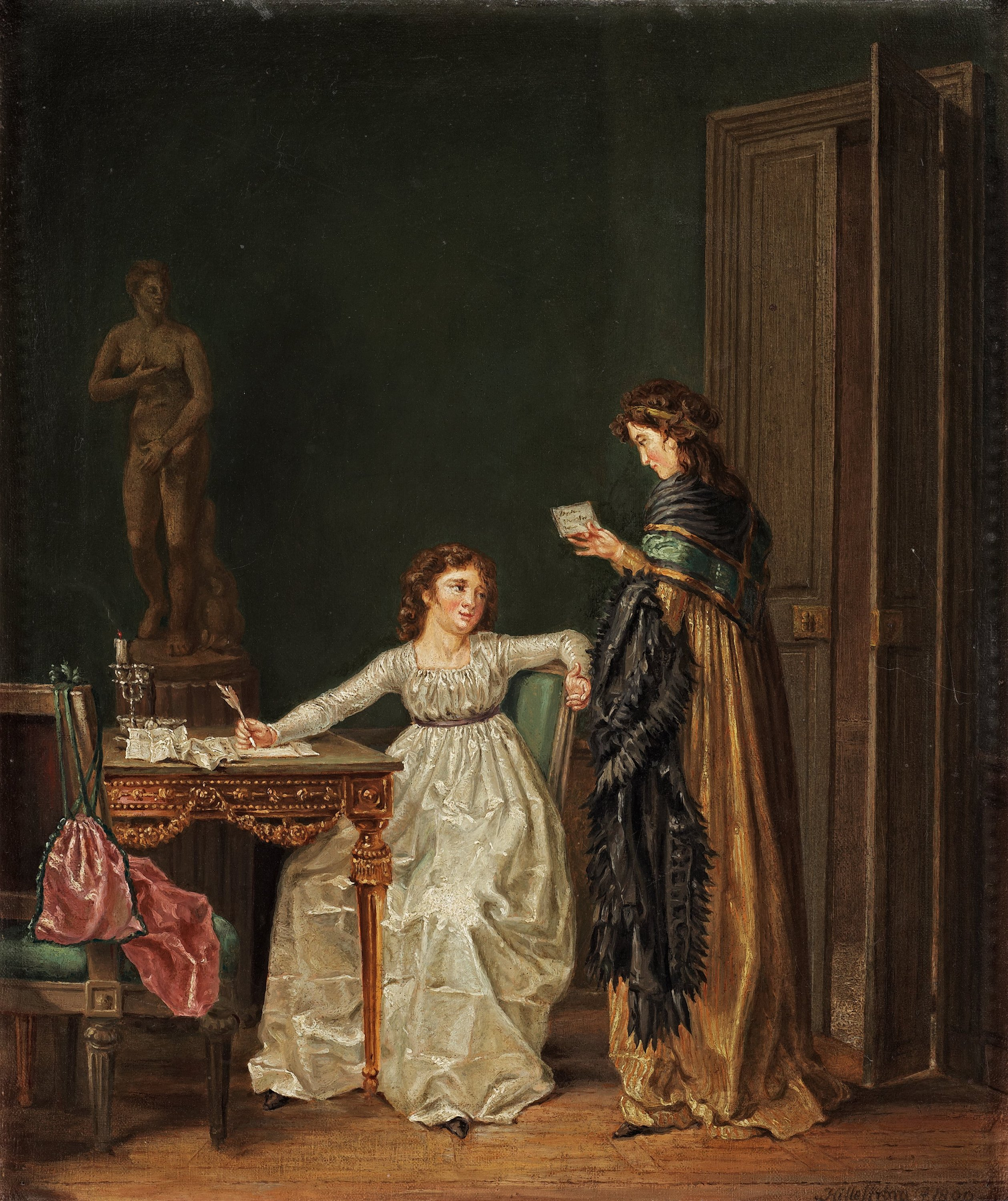 Målning av Pehr Hilelström från ca 1800 som visar två kvinnor som läser och skriver kärleksbrev. Målningen kallas "Kärleksbrevet".